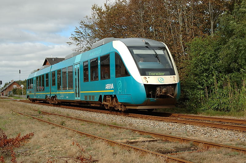 Arriva Danmark Lint 13 te Gredstedbro